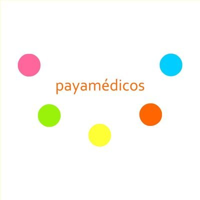 Logo actualizado año 2020